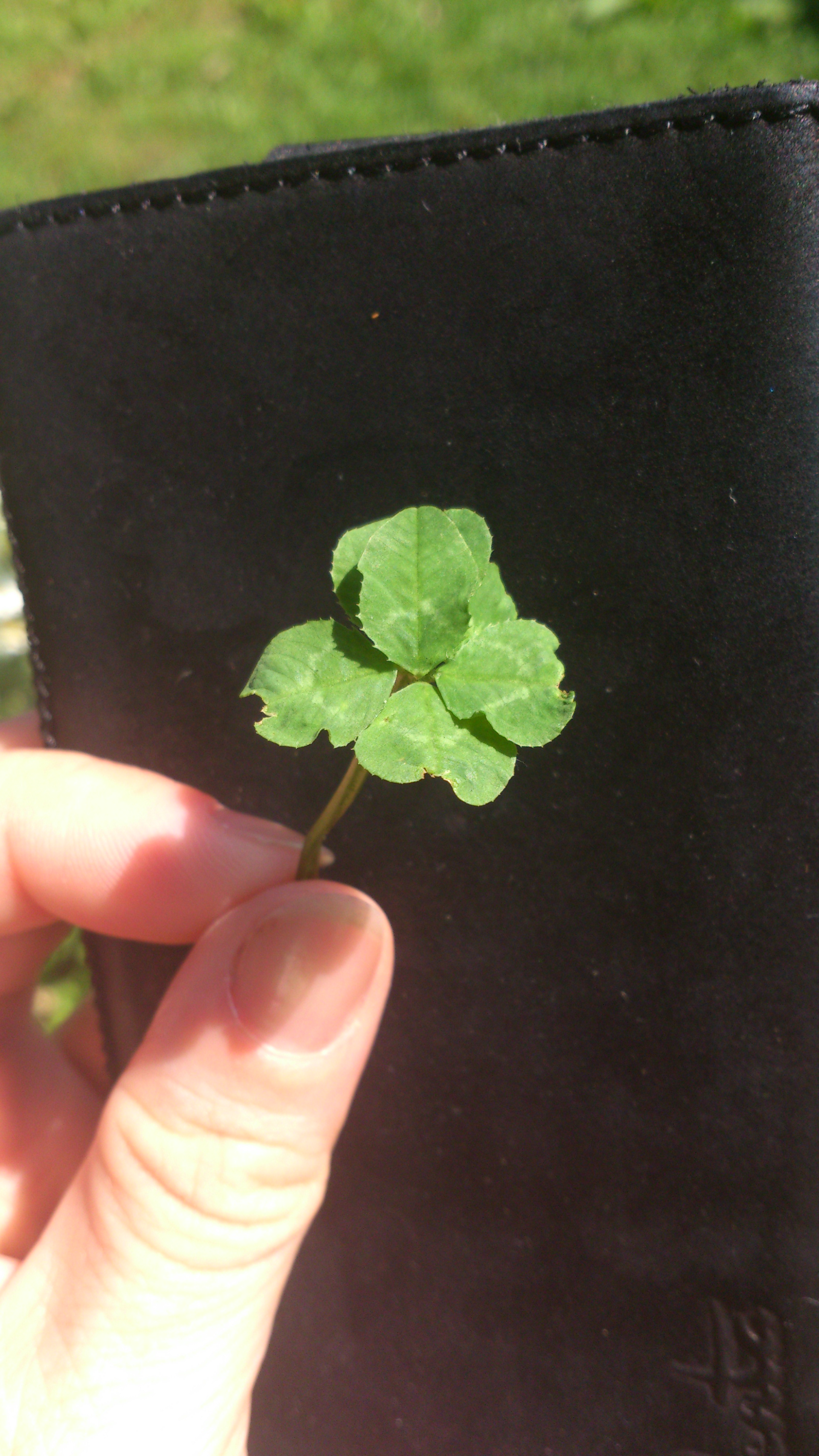 Клевер с четырьмя листьями